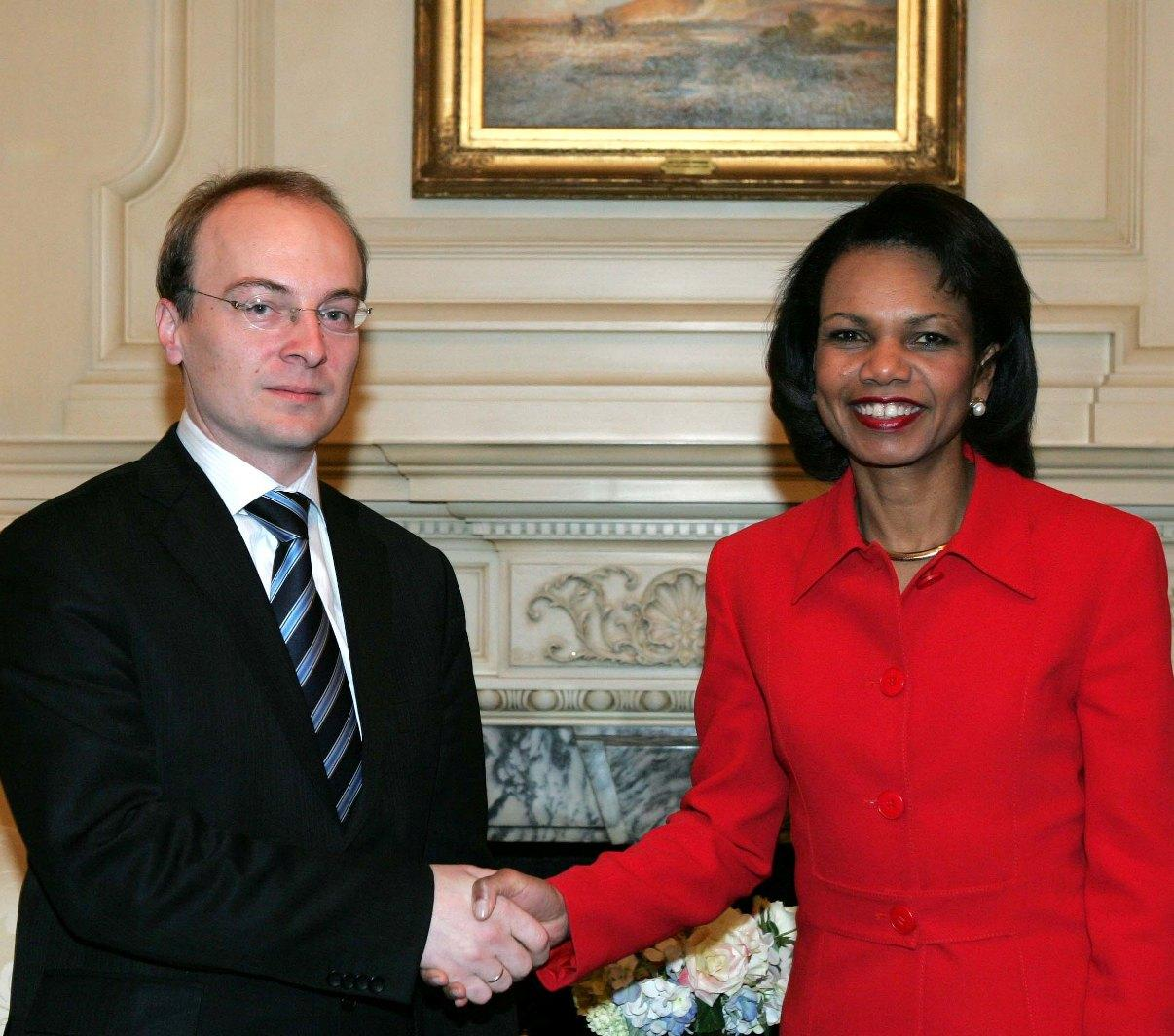 Средба на Антонио Милошоски и Кондолиза Рајс